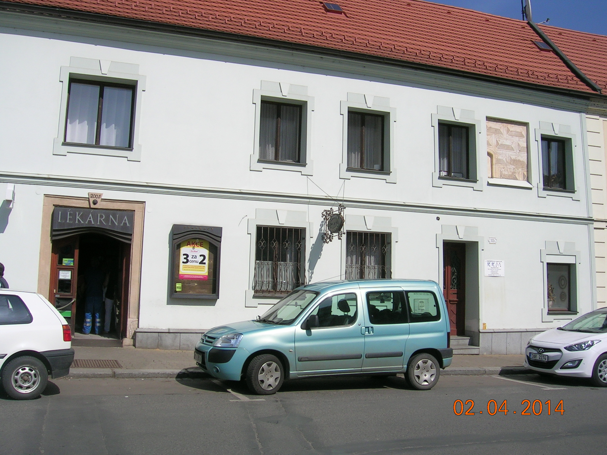 Dům U Barborky